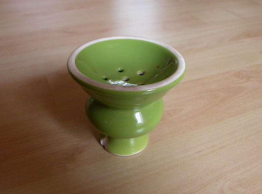 Shisha Bilder